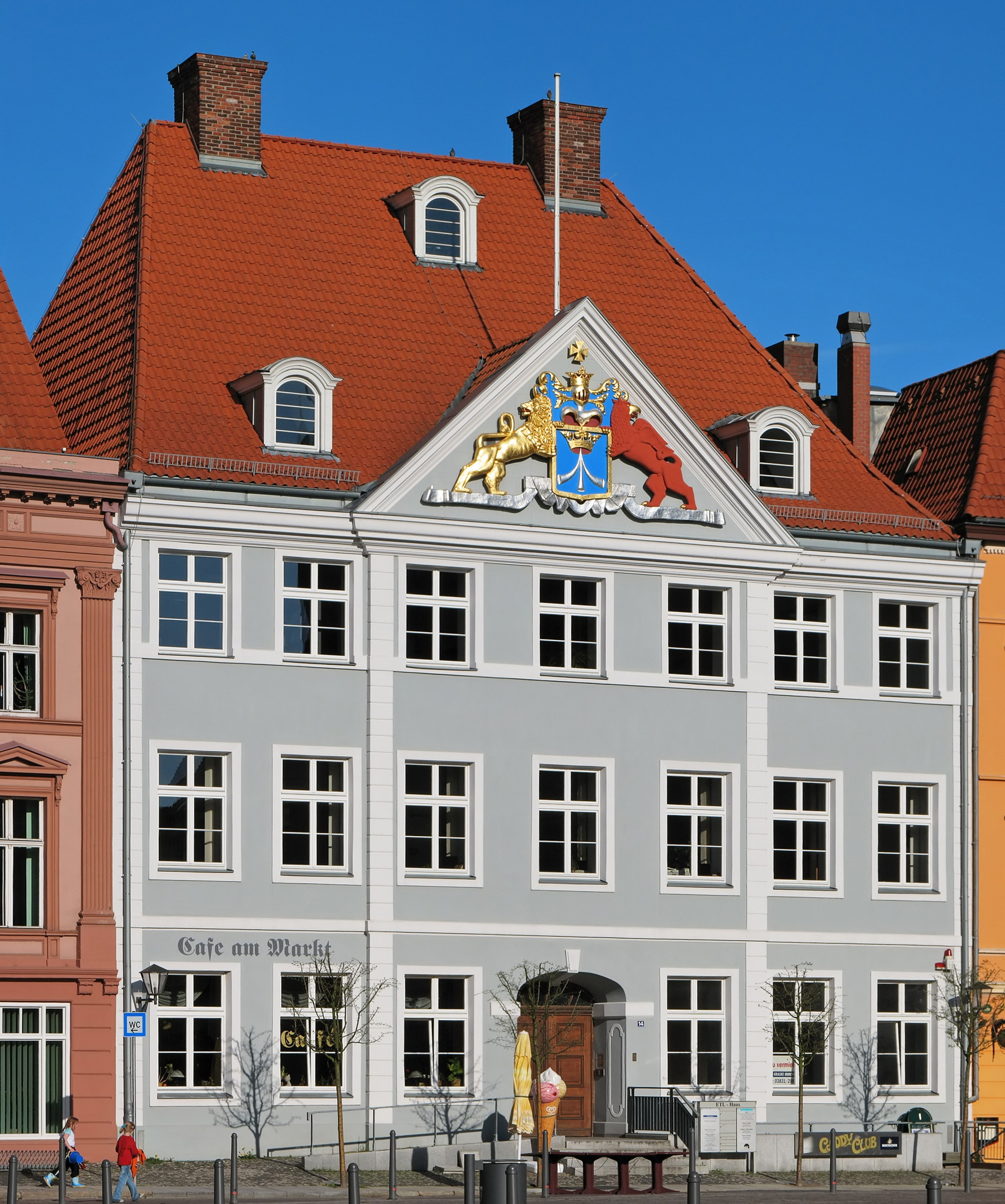 Dieses Bild zeigt das Commandantenhaus in Stralsund.